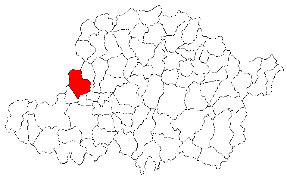 Categorie:Hărţi ale judeţului Arad